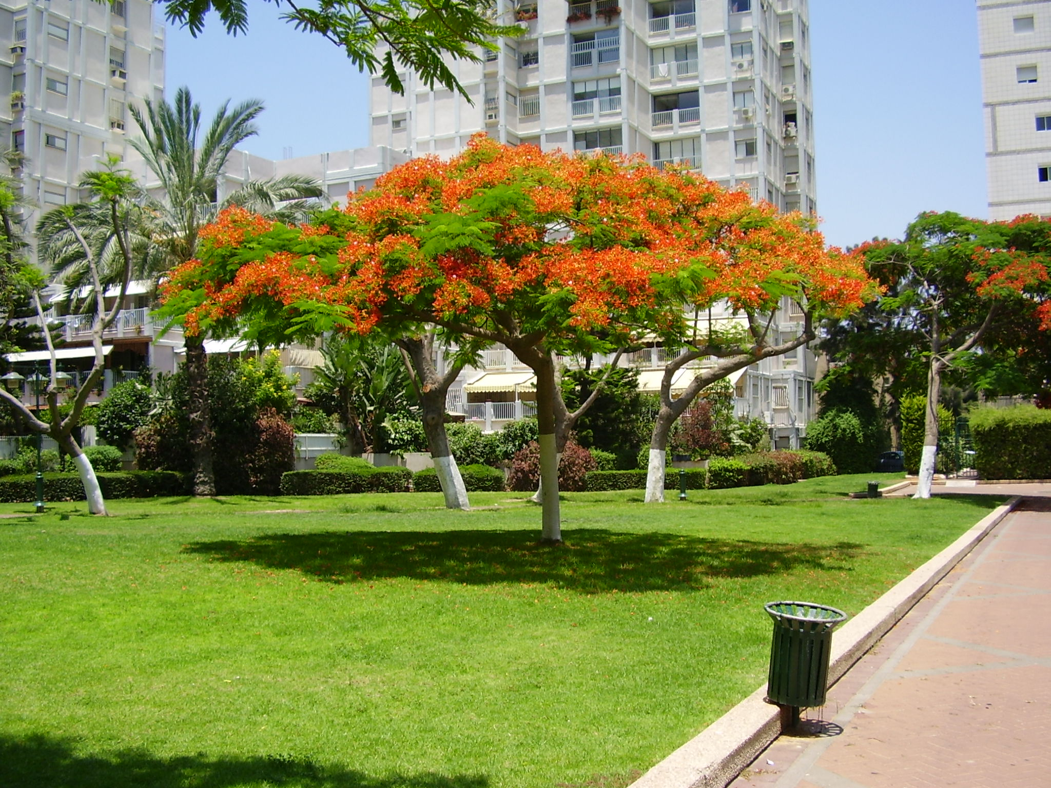 צאלון נאה, ברמת גן, ישראל